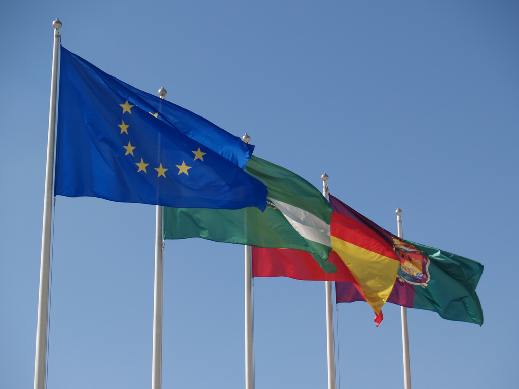 Banderas de la Unión Europea, España, Andalucía y Málaga, (Málaga, España)